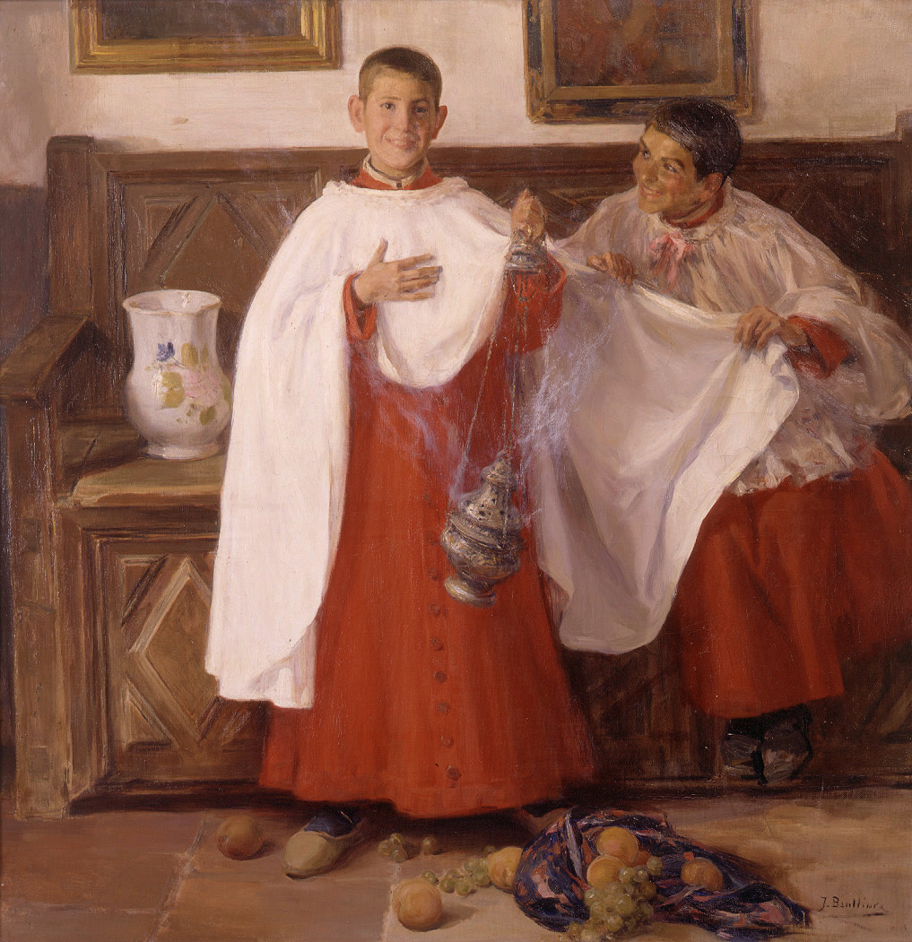 La obra representa a unos jóvenes monaguillos en el interior de una sacristía y vestidos con la indumentaria propia de su condición.